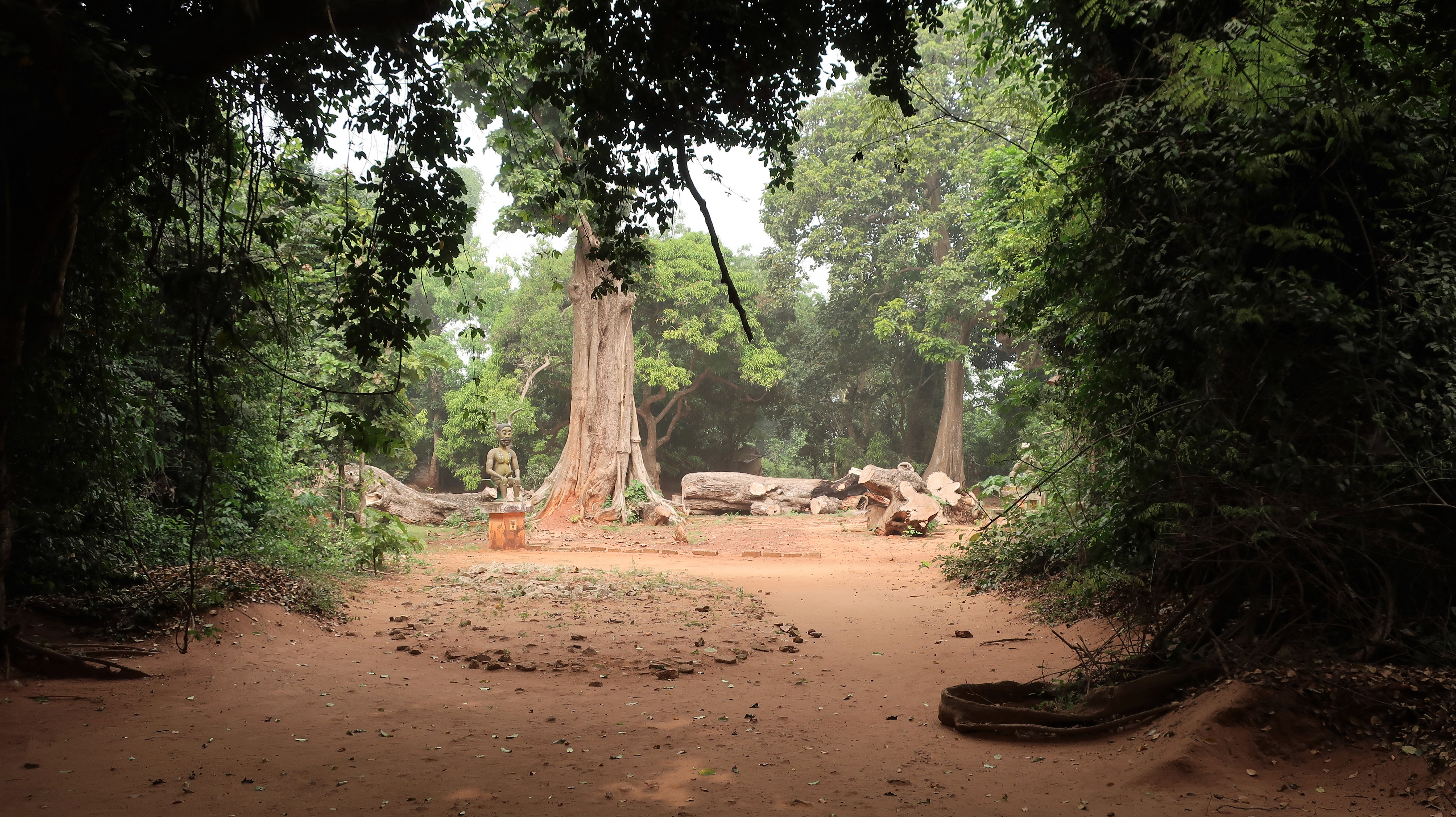 Pyhä metsä, Ouidah, Benin, tammikuussa 2018.